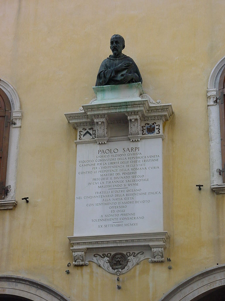 Busto di Paolo Sarpi autore utente:DracoRoboter self made